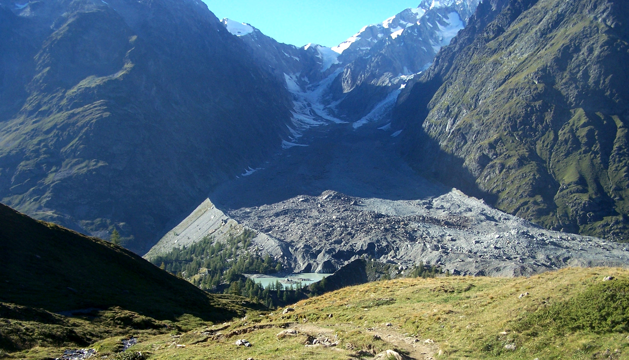 Miagegletscher im Montblanc-Massiv (italienischer Teil)